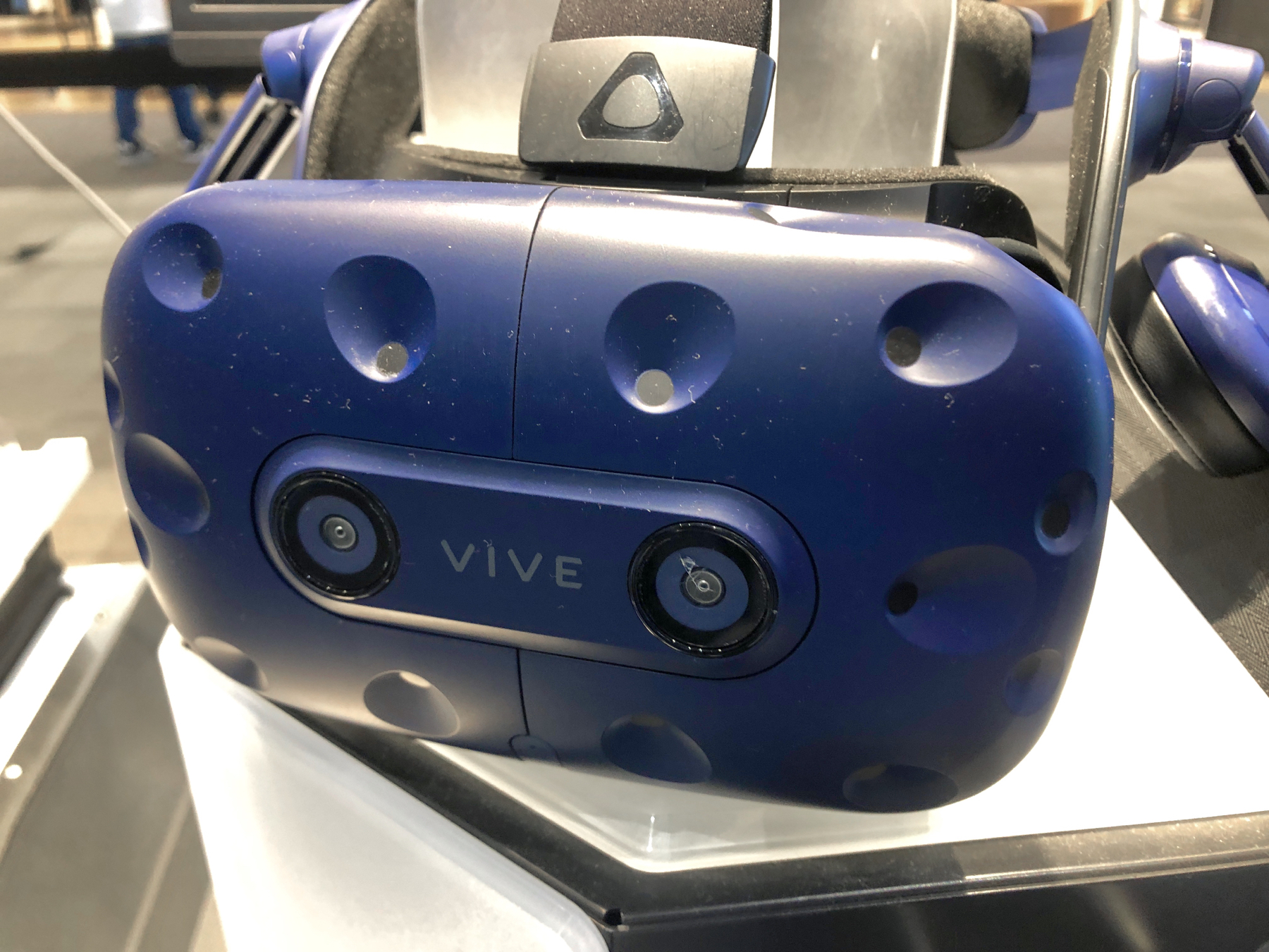 HTC社のHMD「Vive Pro」。